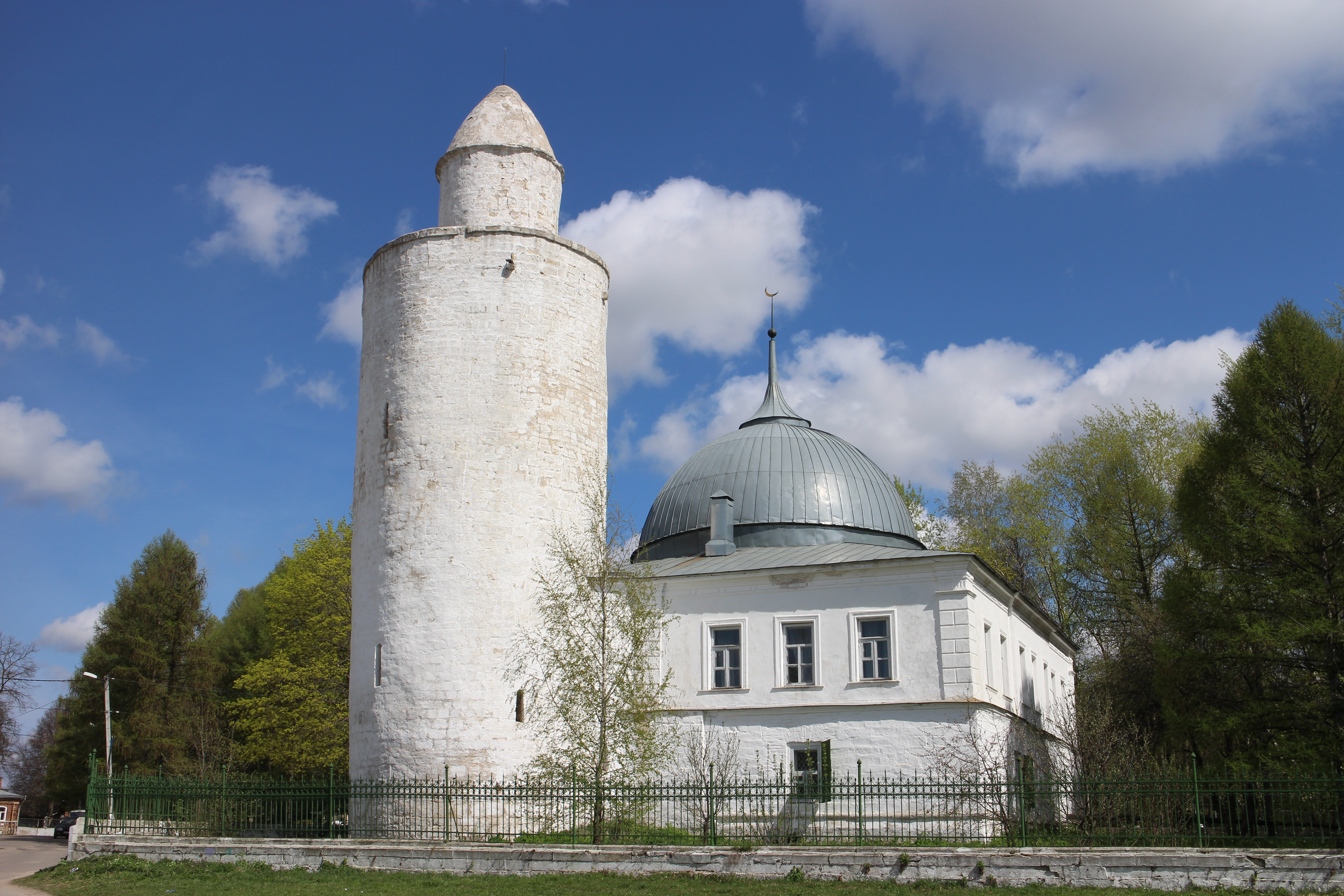 Соборная ханская мечеть с минаретом: площадь Победы, 9, 9-а, Касимов, Рязанская область